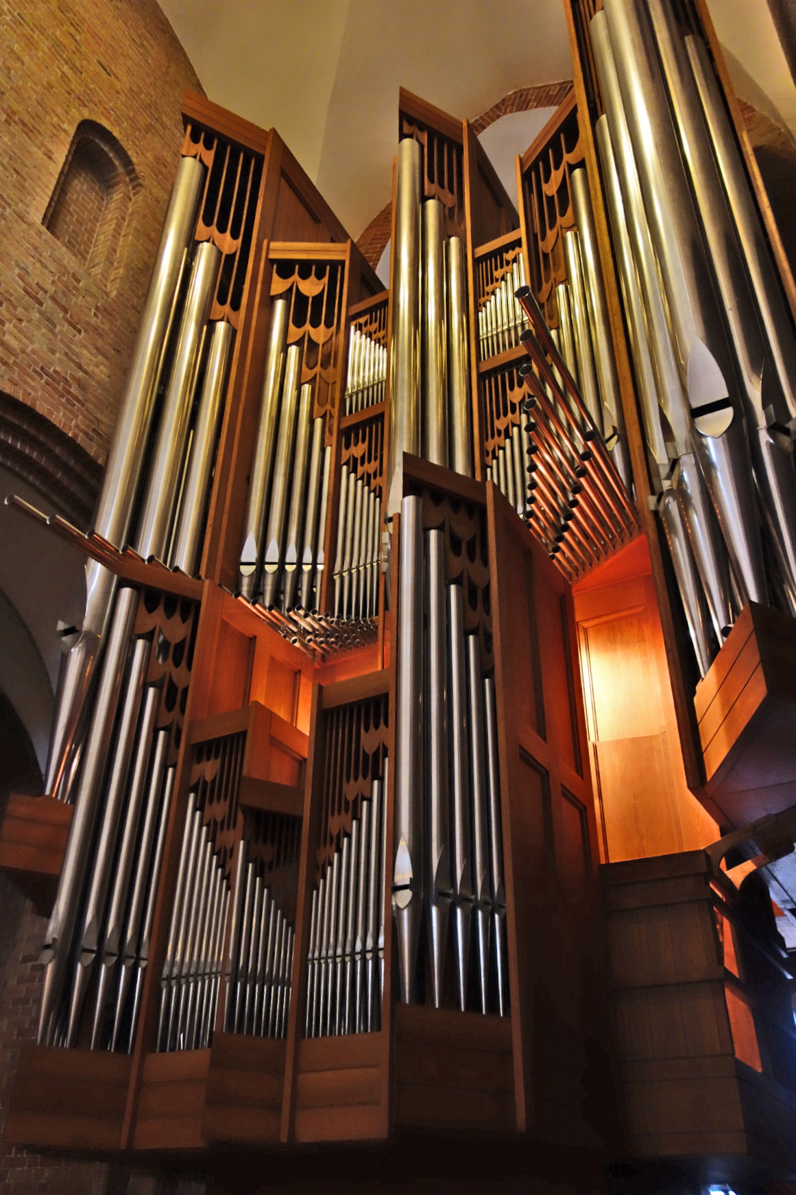 Orgel im Ratzeburger Dom, Schleswig-Holstein